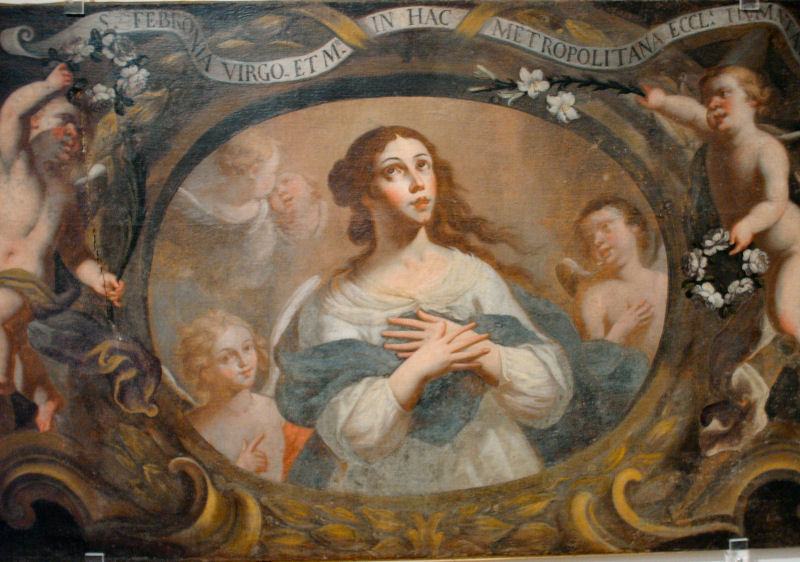 Autore Nicola Gliri Datazione XVII sec. Materia/Tecnica Olio su tela Misure H 192 L 102 Iscrizioni S. FEBRONIA VIRGO ET M. IN HAC METROPOLITANAE ECCL. A HUMATA. Museo Diocesano di Trani Provenienza Cattedrale Trani – soccorpo